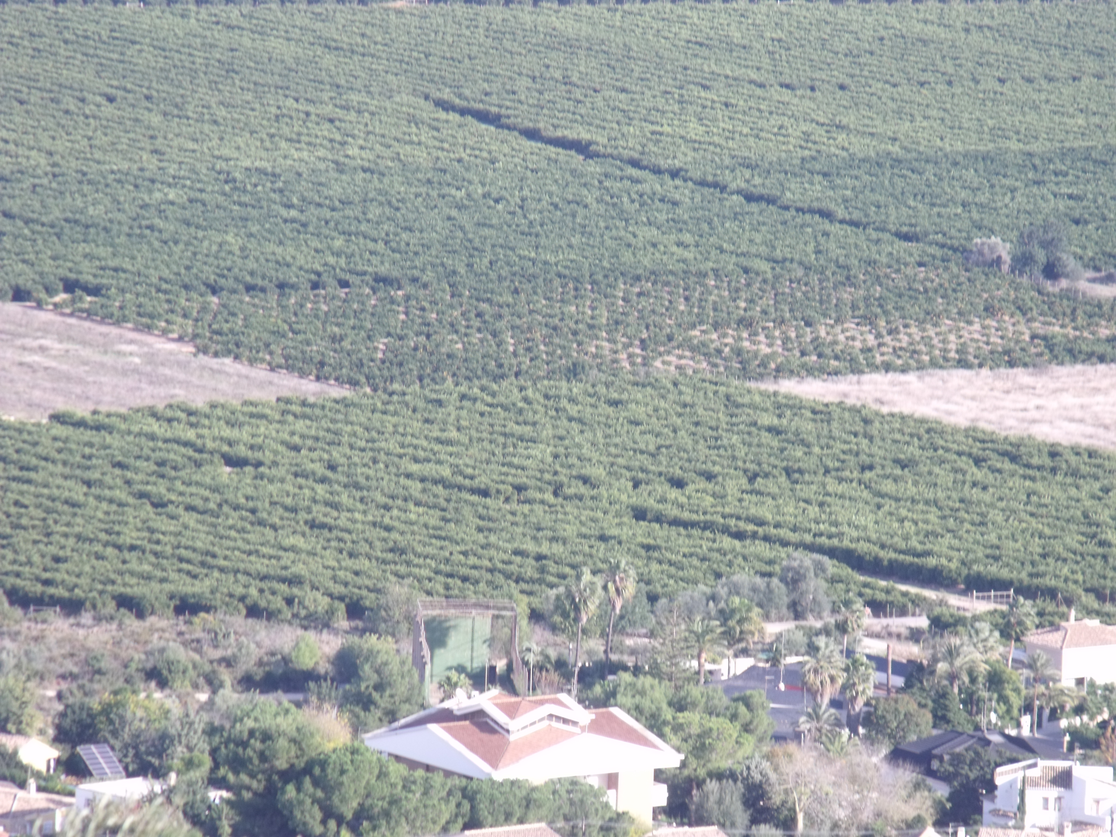 Naranjos en el Pla de Quart. El lugar está en el extremo sudoriental del término de Chiva, municipio de la Hoya de Buñol — Valencia (España).